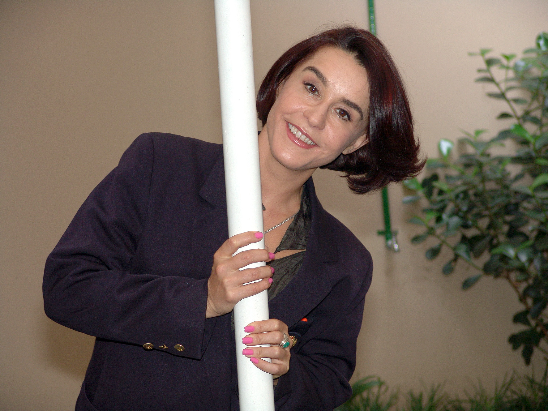 Lucélia Santos